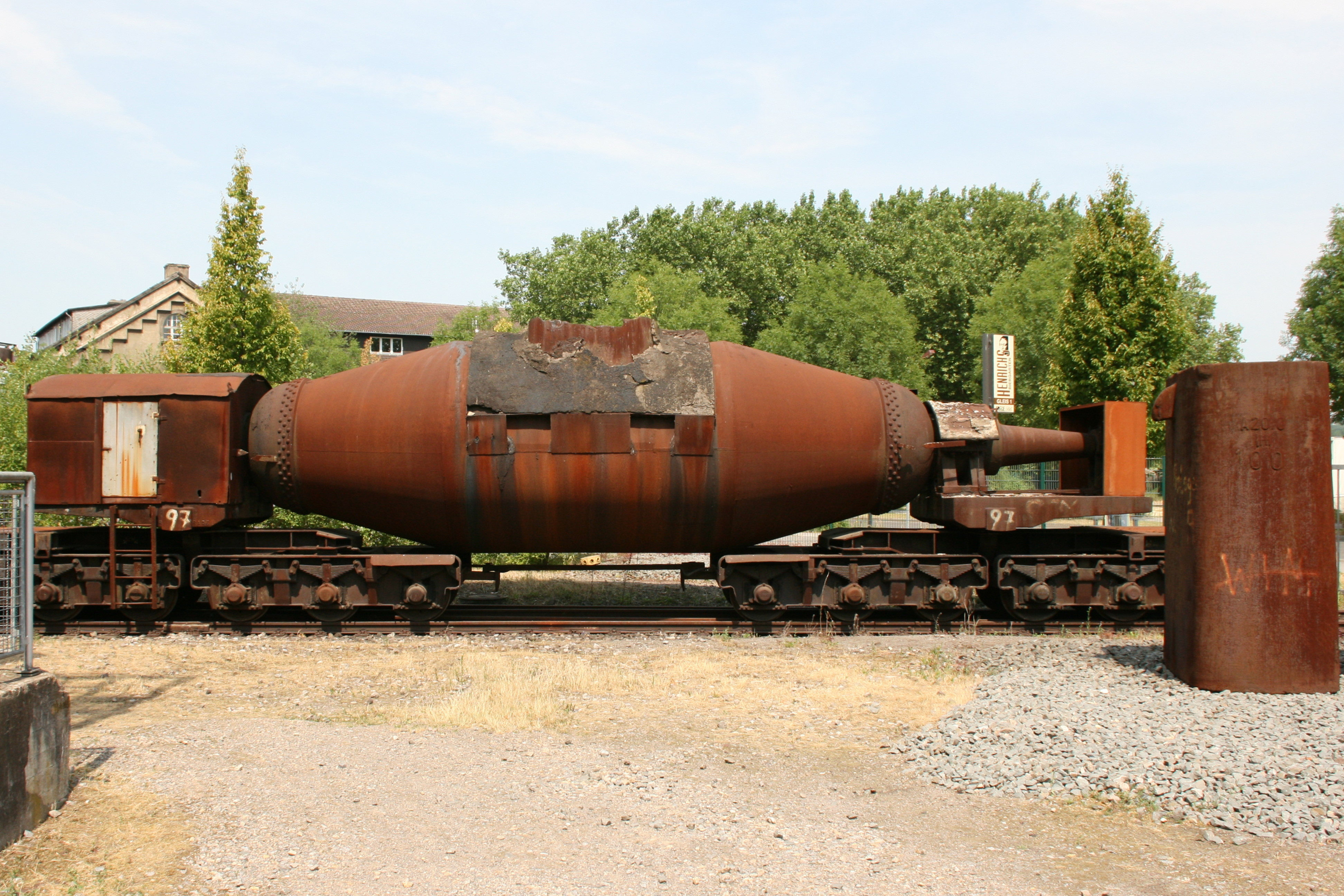 Schienenfahrzeuge (Torpedowagen) der Henrichshütte in Hattingen